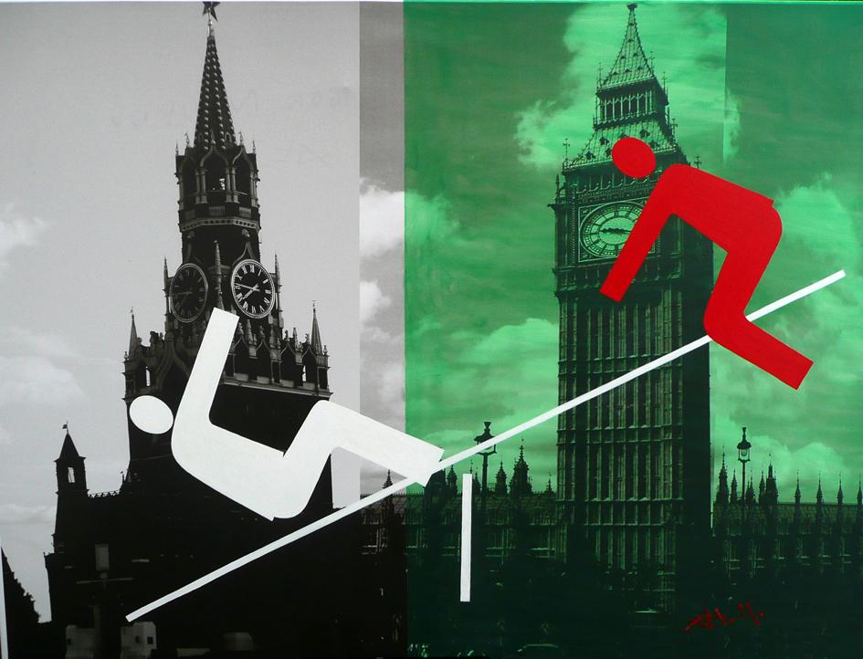 Gemälde Öl auf Leinwand 140 X 190 cm 2004